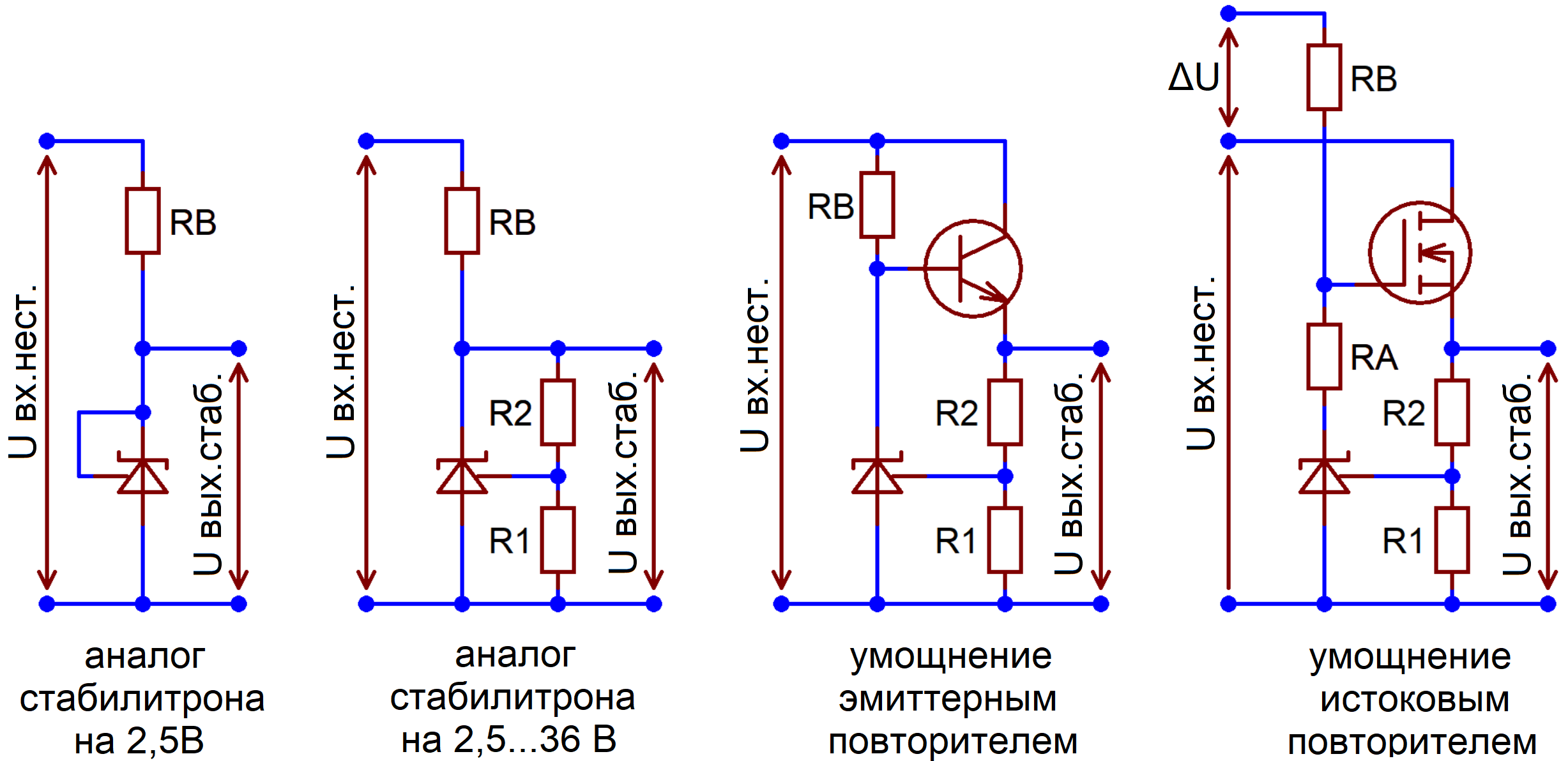 Базовые конфигурации линейных стабилизаторов на TL431